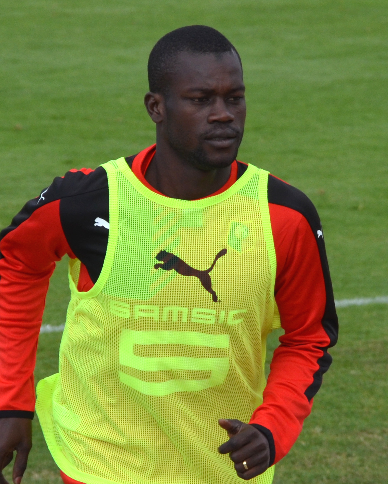 Photographie prise lors du match opposant le Stade rennais au Havre AC en amical au stade Paul-Audrin de Dinard le 8 juillet 2015. Ici, Fallou Diagne.